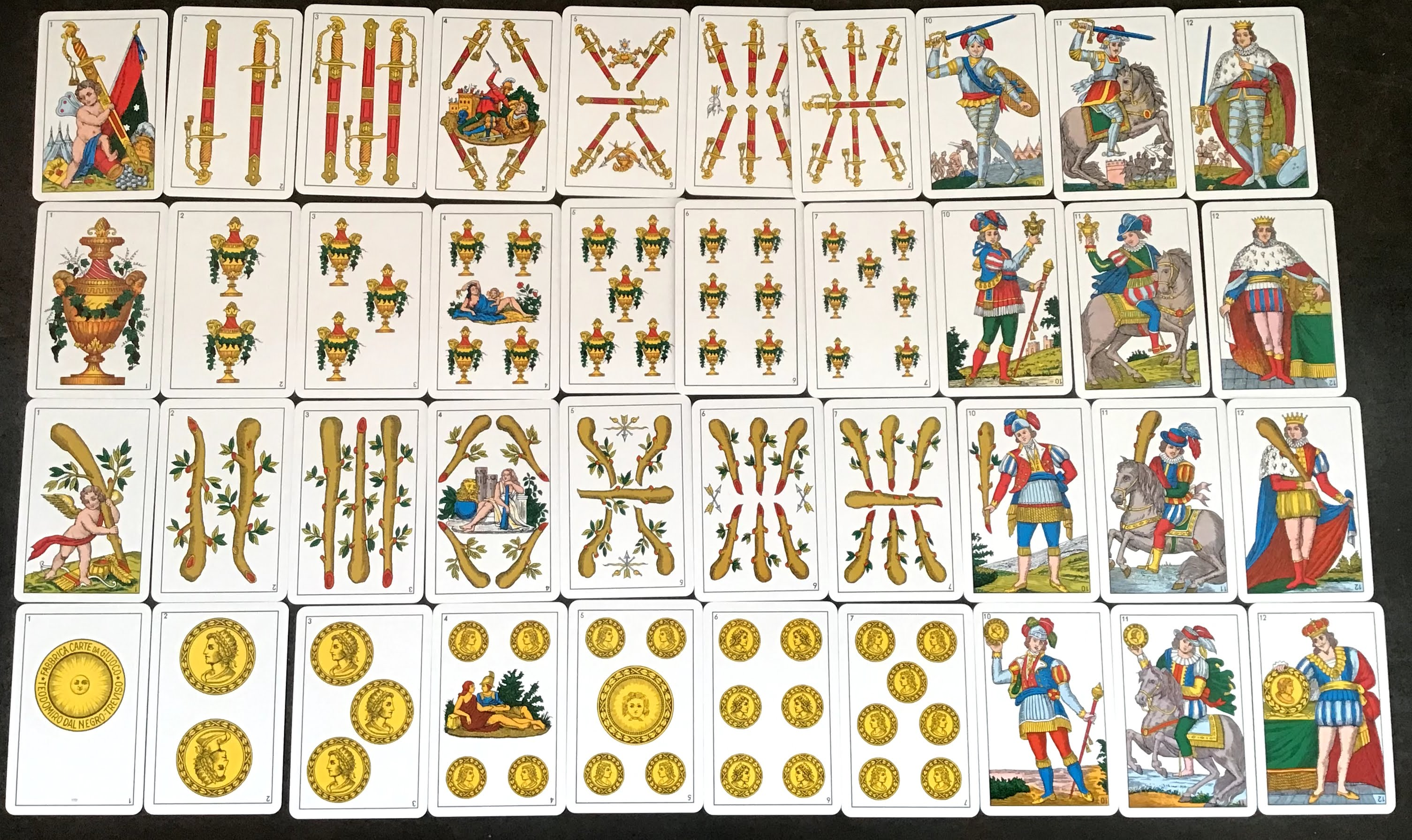 Mazzo da 40 carte sarde